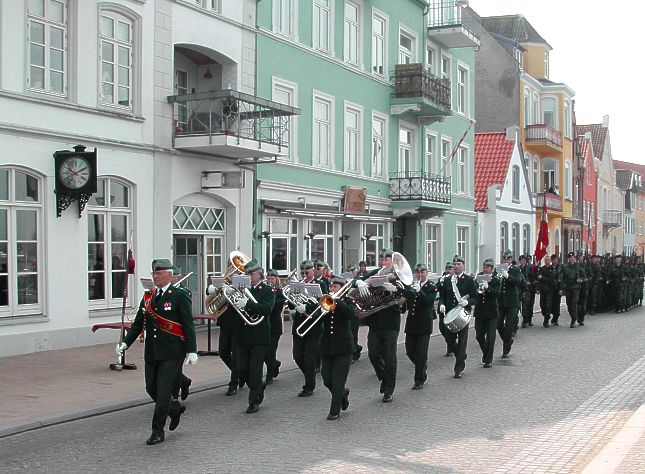 Parade zum 140. Jahrestag der Erstürmung der Düppeler Schanzen / Dänisches Militär marschiert mit einer Kapelle vorweg durch Sønderborg. Sie sind die Delegation des dänischen Militärs, welches sich jährlich zum Düppel-Tag dorthin und wieder zurück begibt – und das eben nicht im Bus, wie die deutsche Bundeswehr-Delegation (das waren dieses Jahr Panzergrenadiere aus Ahlen), sondern mit großem Zeremoniell. Auf dem Weg der Anhöhe von Düppel bis in die Innenstadt von Sonderburg waren alle paar Meter Fahnenmasten mit dem Danebrog aufgestellt worden. Denn der Düppel-Tag ist in Dänemark militärischer Flaggtag. Aber auch die meisten Privatgrundstücke mit Fahnenmast zeigten den Danebrog, denn dieser Tag ist nun mal wichtig in Dänemark. Was zur Kapelle vielleicht bemerkenswert ist: Ich dachte, dass sie auf dem ganzen Marsch ein Stück nach dem anderen spielen werden. Das taten sie aber nicht, jedenfalls nicht so, wie ich das vermutet hätte. Stattdessen legten sie immer wieder längere Pausen ein, wo nur getrommelt wurde, und da immer derselbe Takt, was aber schon fast verjazzt klang. In Sonderburg zogen sie zuerst zum Rathaus und danach an der Hafenstraße zu ihrer Garnison (oder genauer: Unteroffizierschule) zurück. Dort am Hafen entstand das Foto.